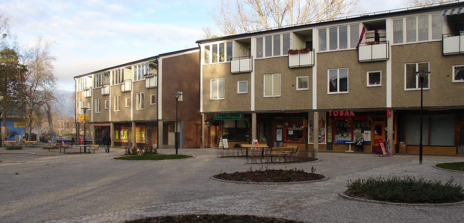 Solberga, Kristalltorget